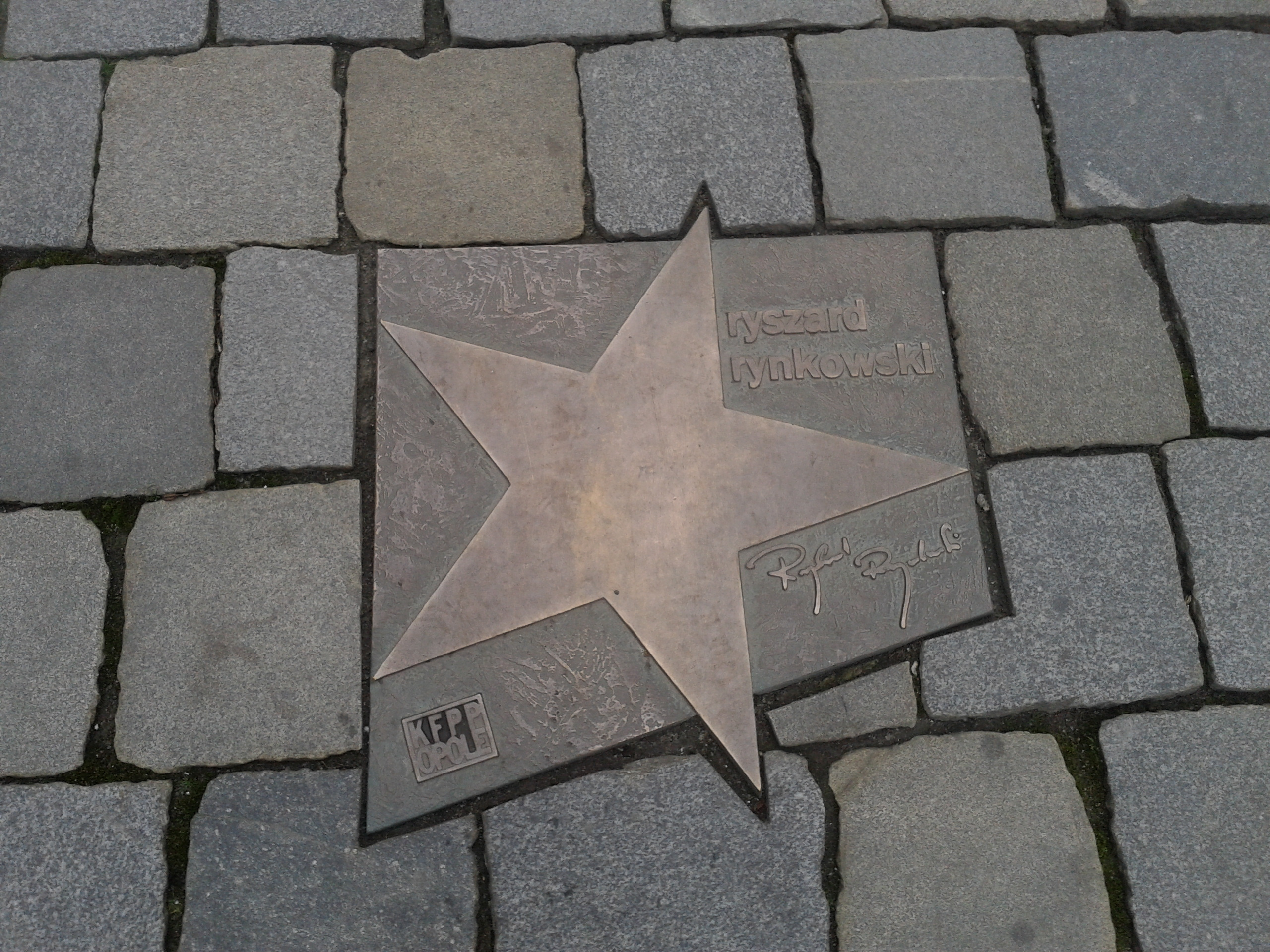 Gwiazda Rynkowskiego w Alei Gwiazd Polskiej Piosenki w Opolu.